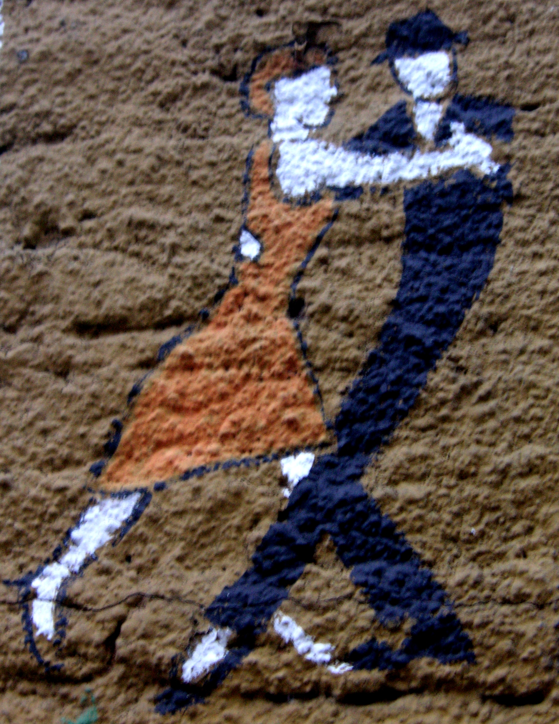 Argentine Tango Art